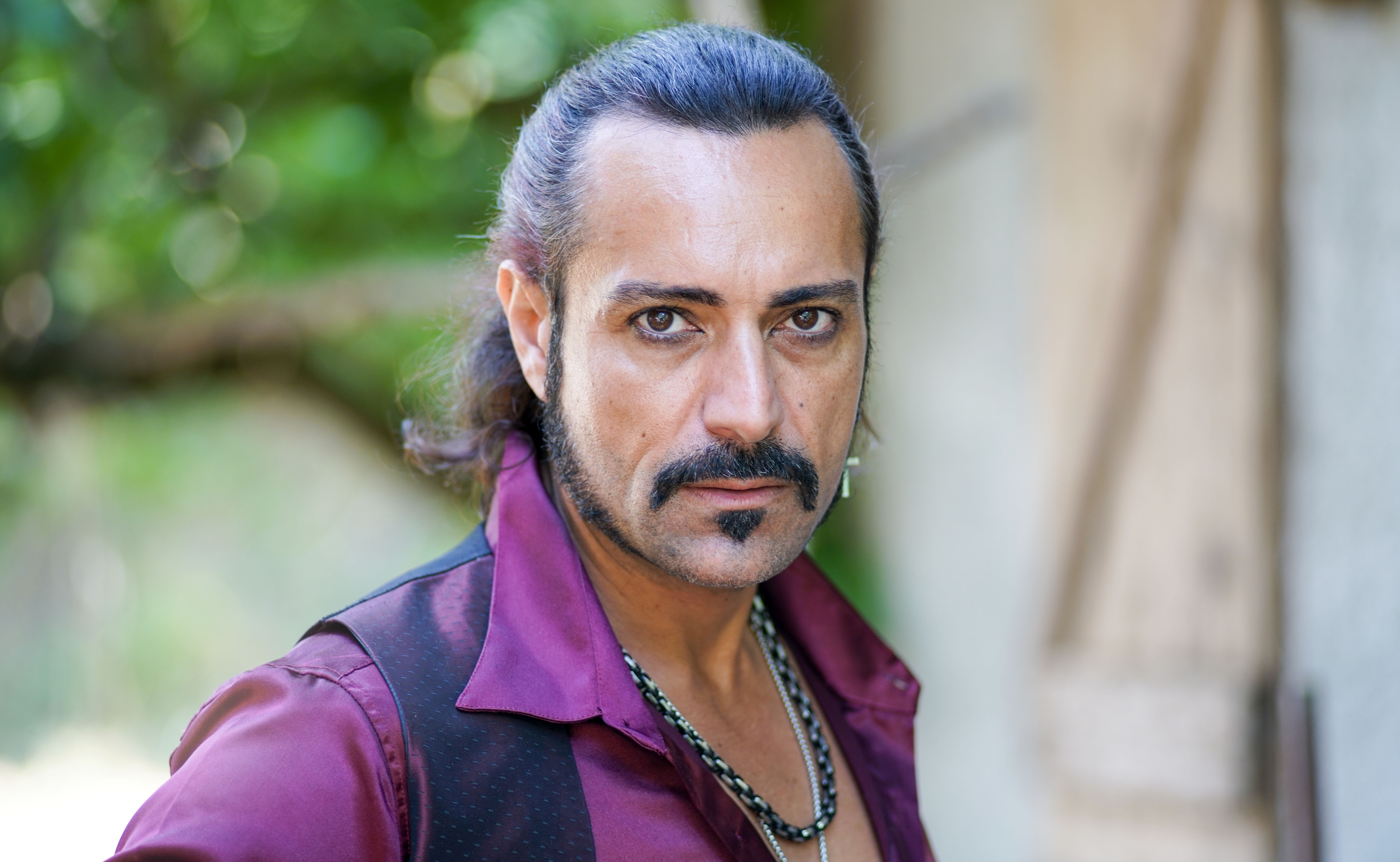 Pietro Delle Piane sul set del film "Rapiscimi"